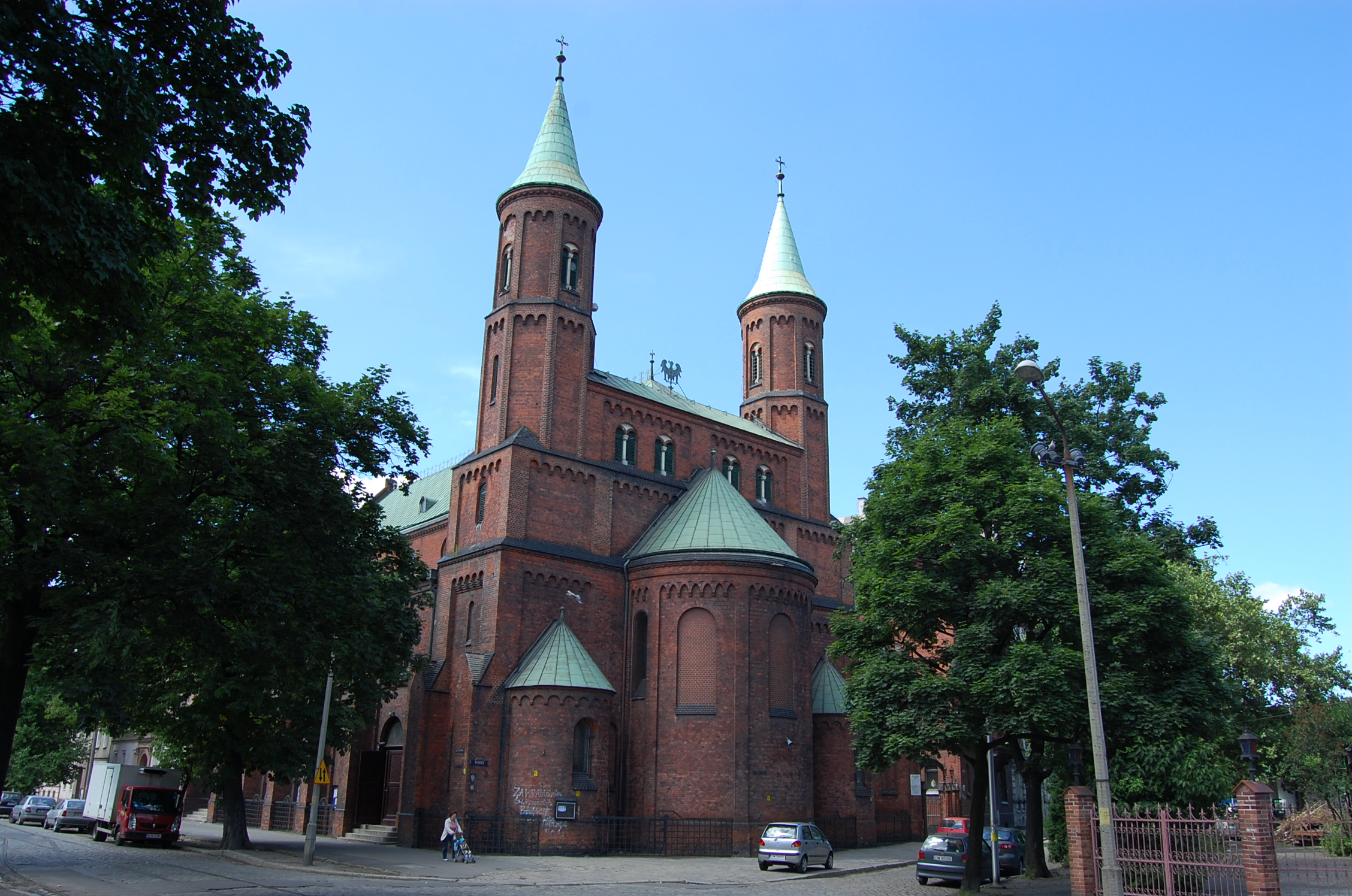 Parafia św. Bonifacego we Wrocławiu, Widok na kościół od strony Skweru Sybiraków